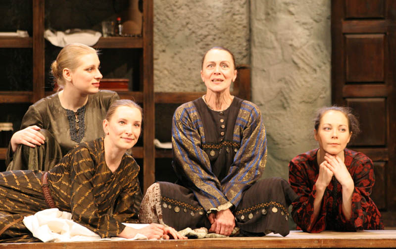 Сцена из спектакля Саратовского академического театра драмы «Дом Бернарды Альбы» по пьесе Федерико Гарсиа Лорка. Актрисы Дарья Родимова, Алиса Зыкина, Евгения Торгашова, Татьяна Родионова